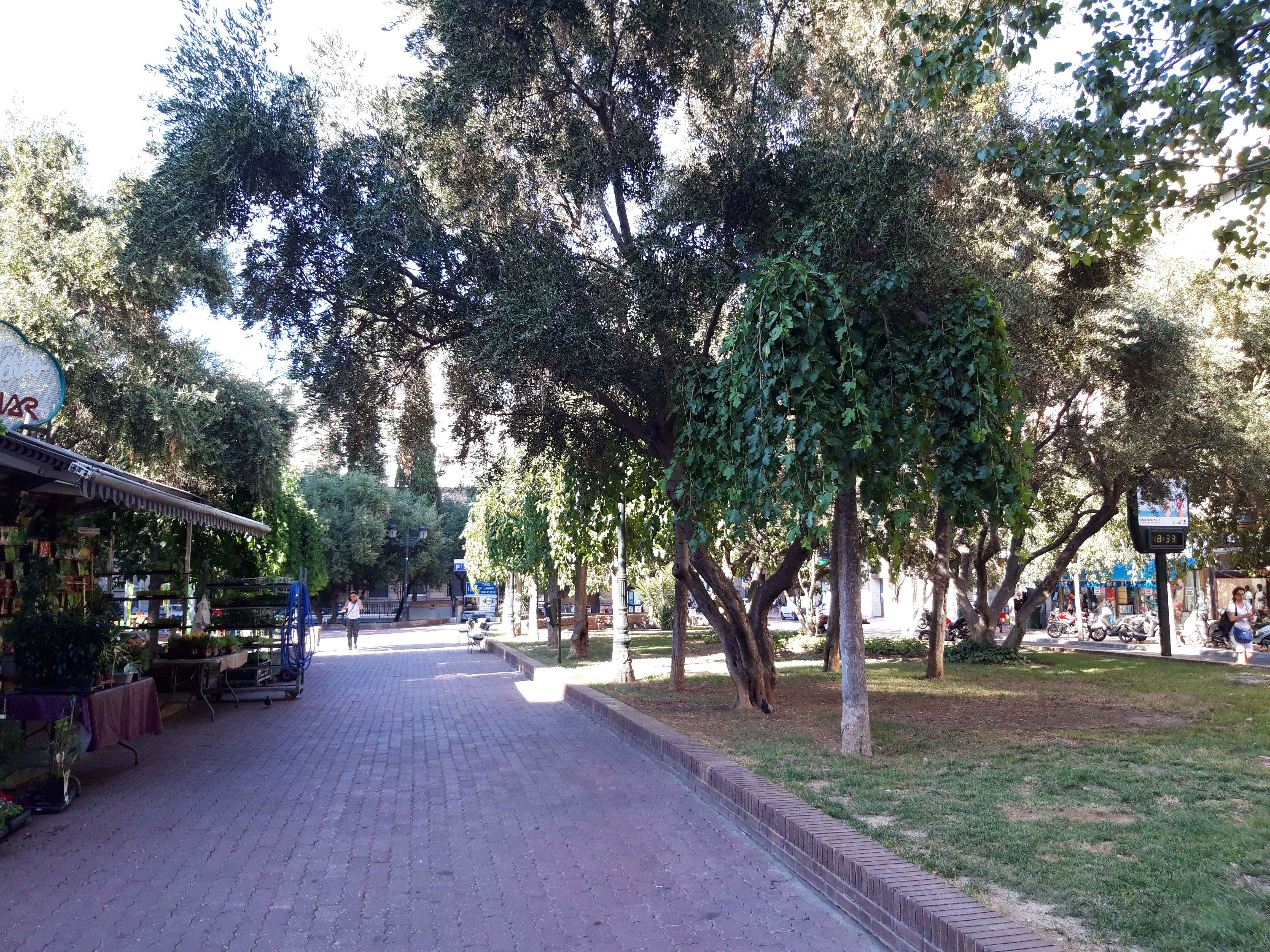 Aragonés: Plaza Salamero, Zaragoza